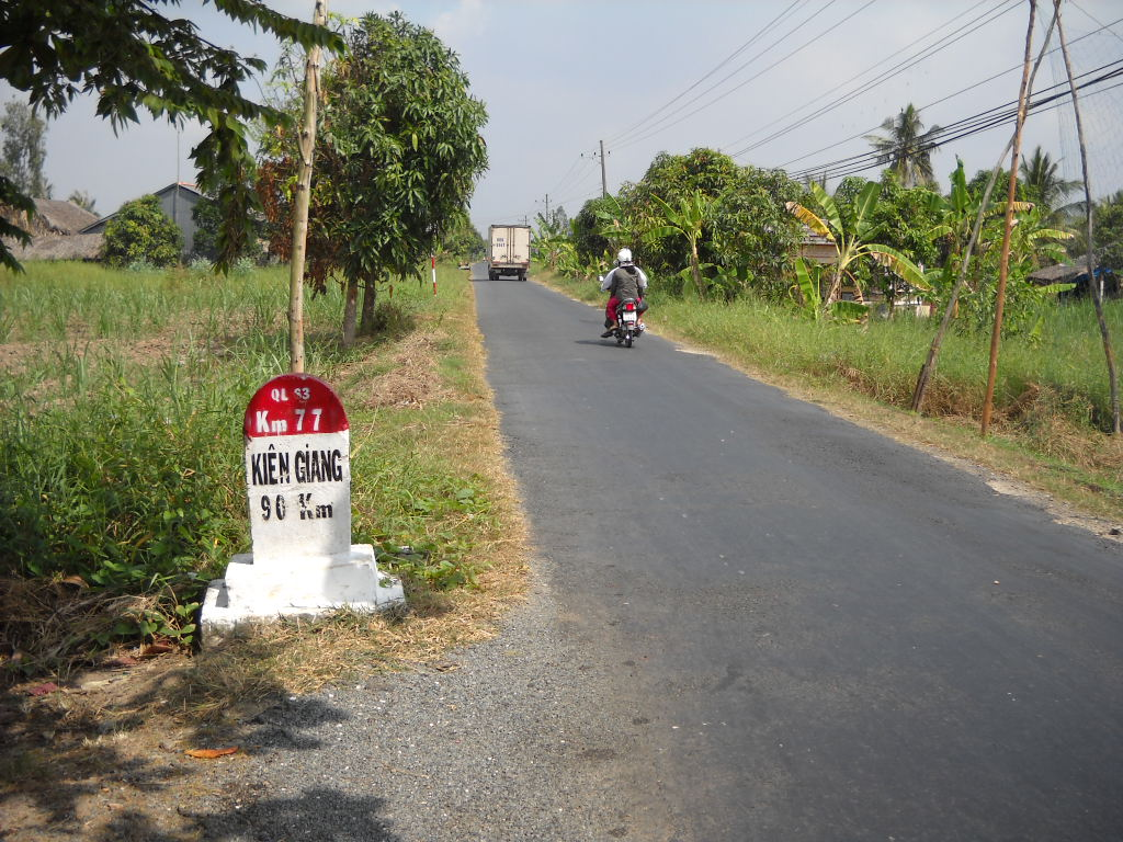 Thể loại:Quốc lộ Việt Nam